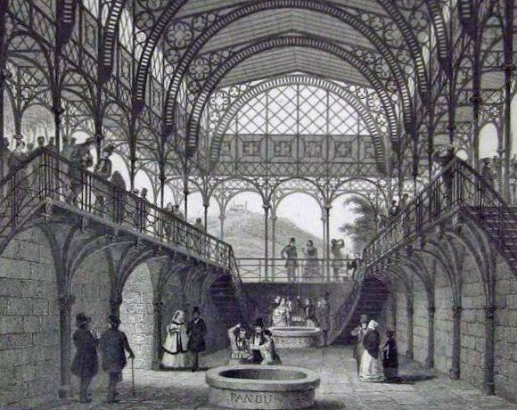 Guss- und schmiedeeiserne Brunnenhalle in Bad Kissingen; erbaut 1842 nach dem Entwurf von Friedrich von Gärtner